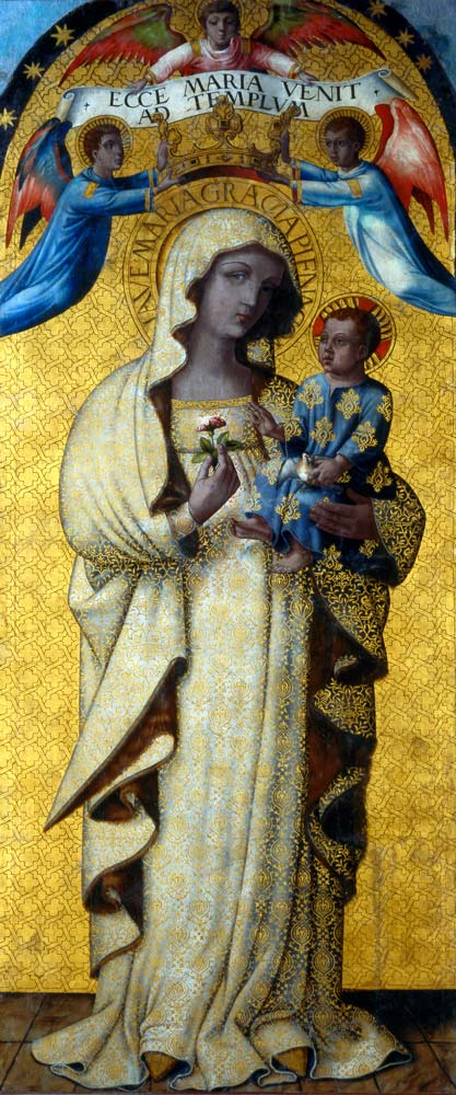 Virgen de Antigua de Sevilla, pintada por Hernando de Esturmio en 1540. Conservada en el convento de Santa Clara, Medina del Campo